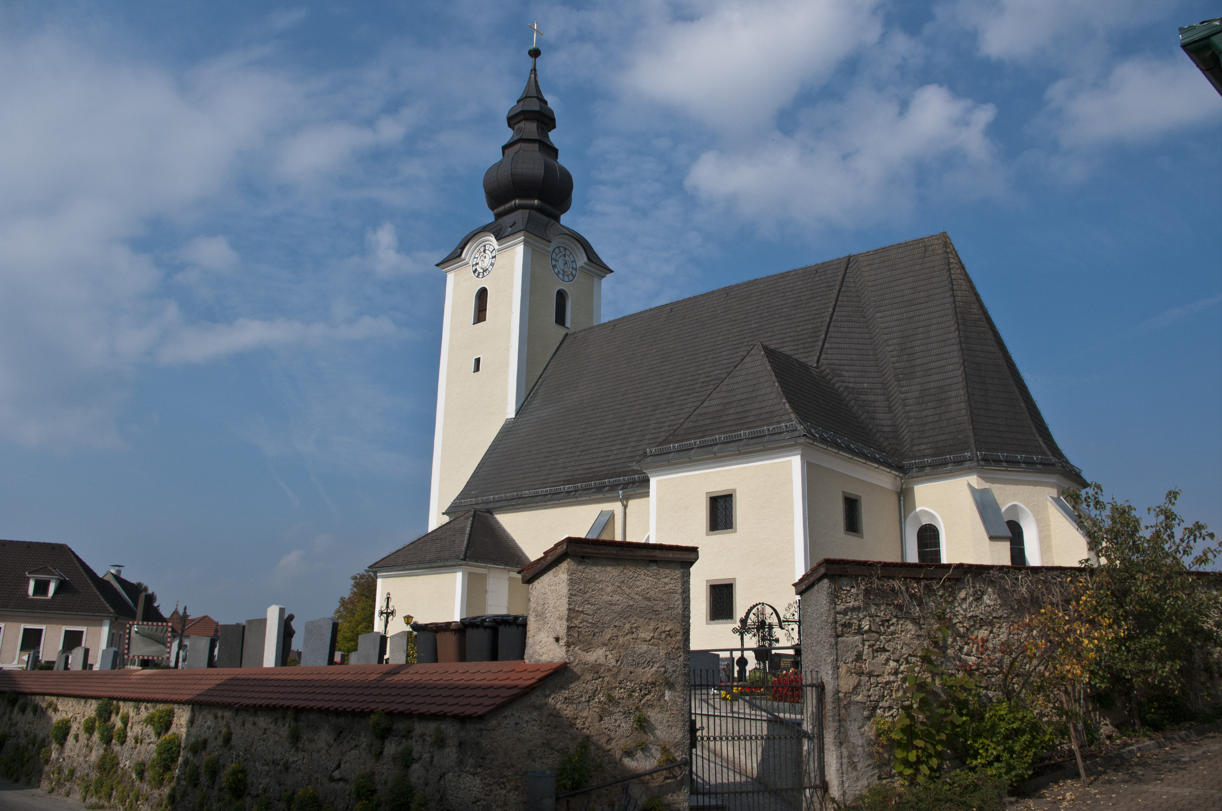 Kath. Pfarrkirche hl. Stephan und Friedhof